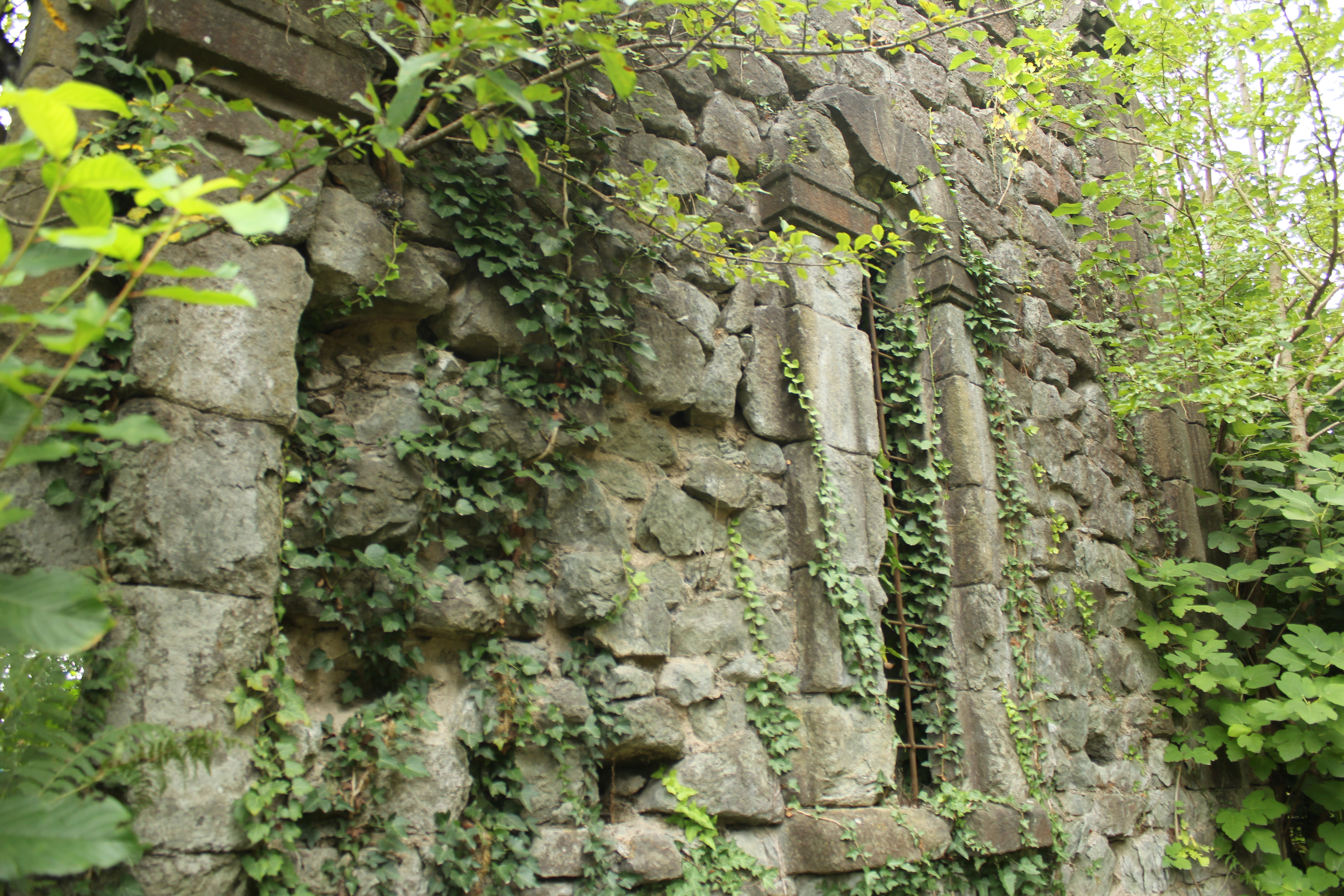 წმინდა გიორგის სახელობის ეკლესიის ნანგრევები